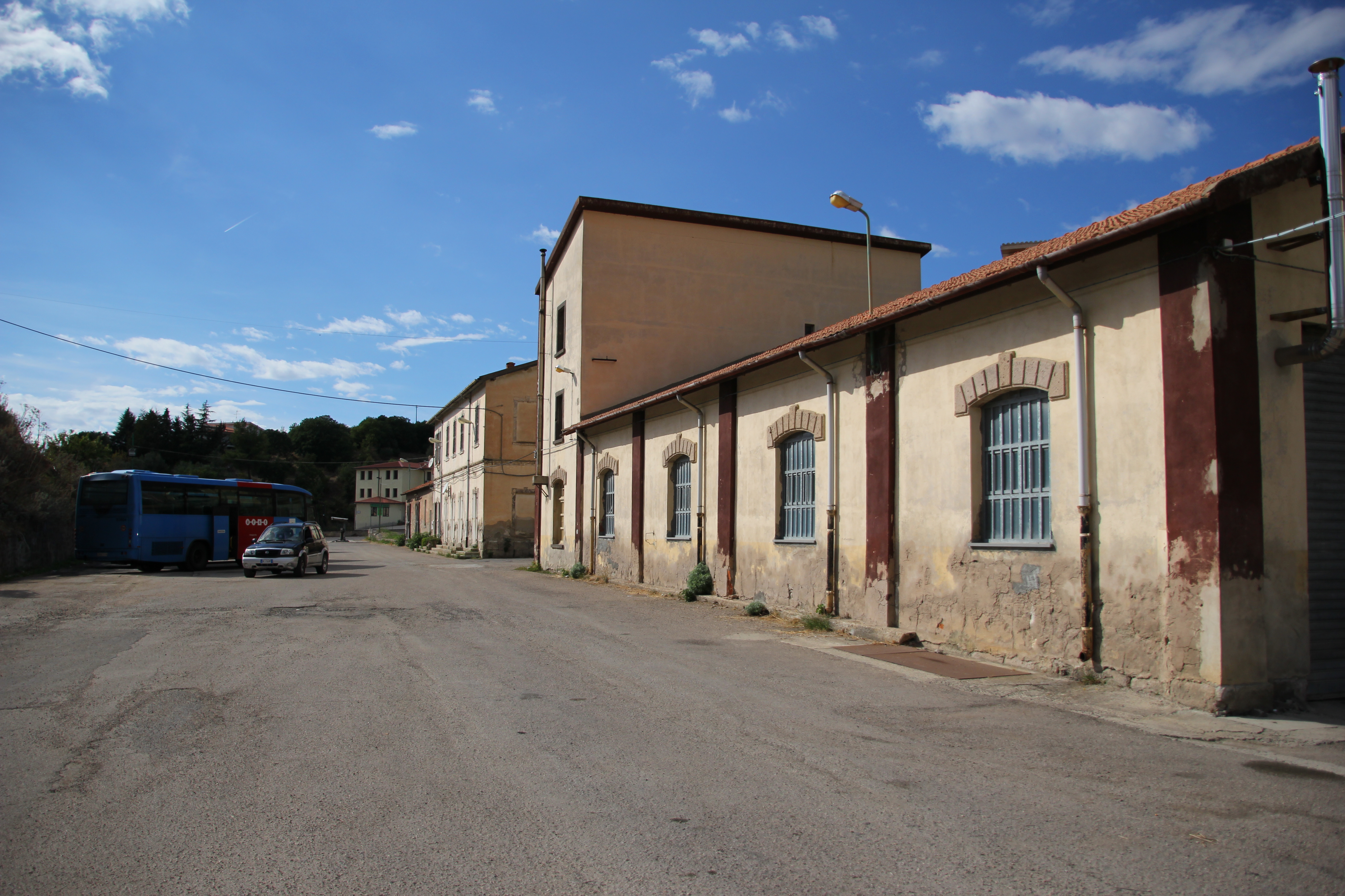 Ozieri - La vecchia stazione ferroviaria